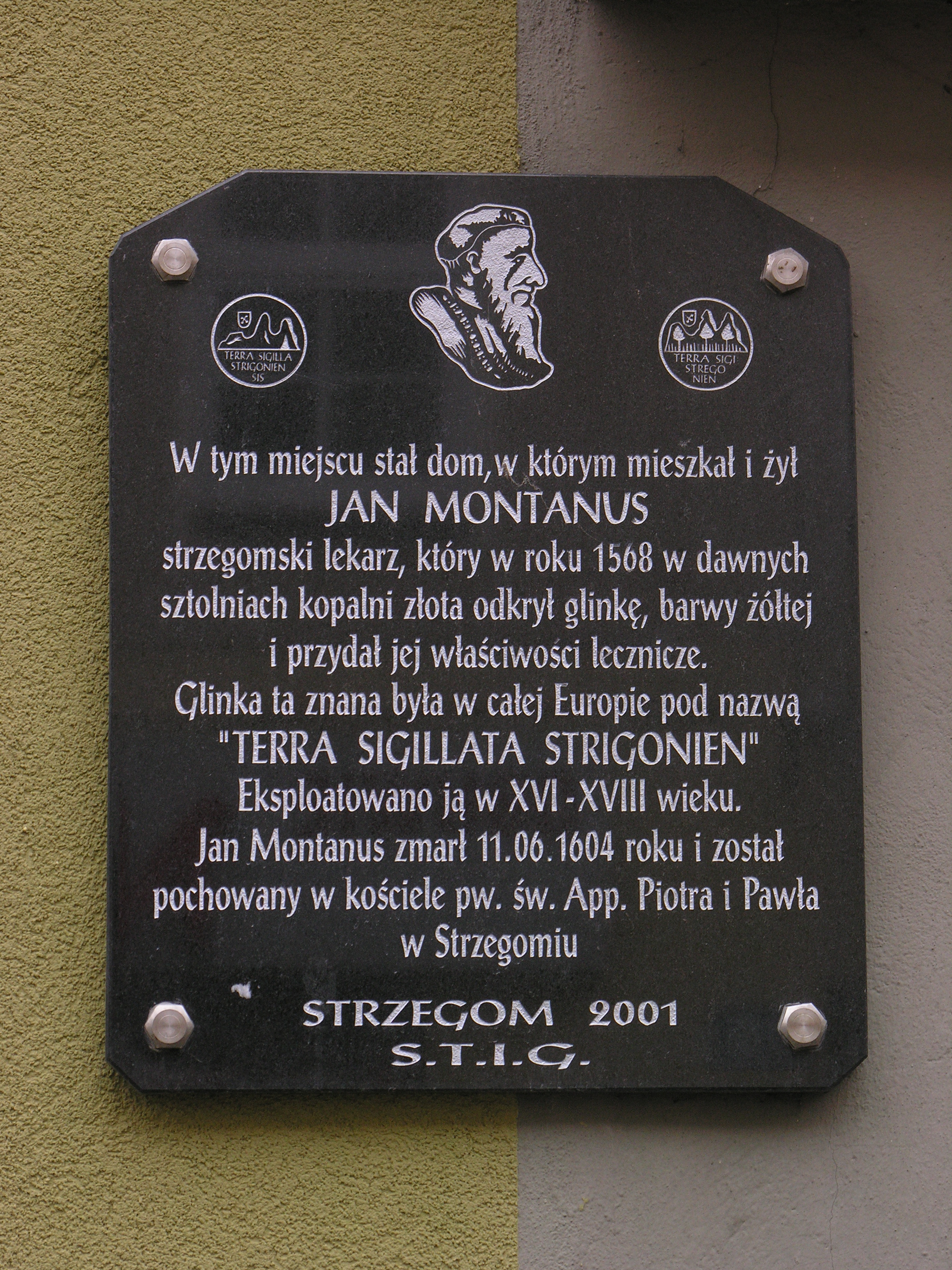 Tablica ku czci Johannesa Montanusa w Strzegomiu, ul. Dąbrowskiego 22